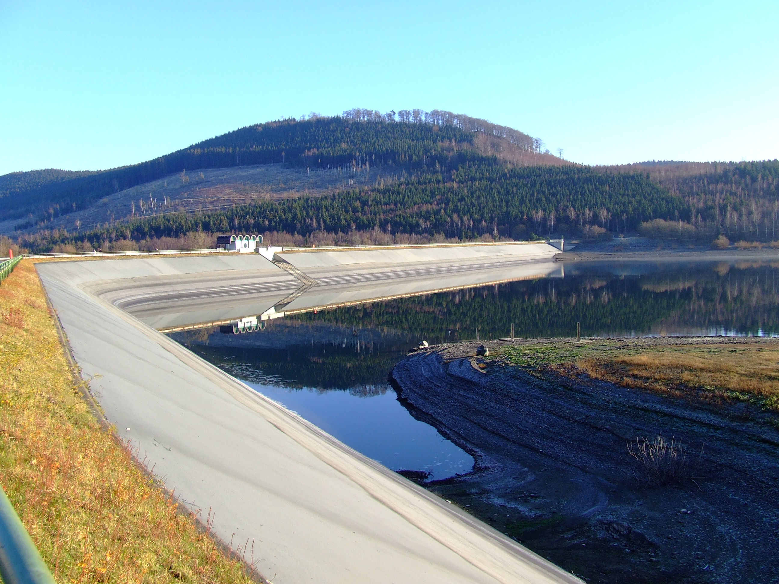 Staudamm der Granetalsperre